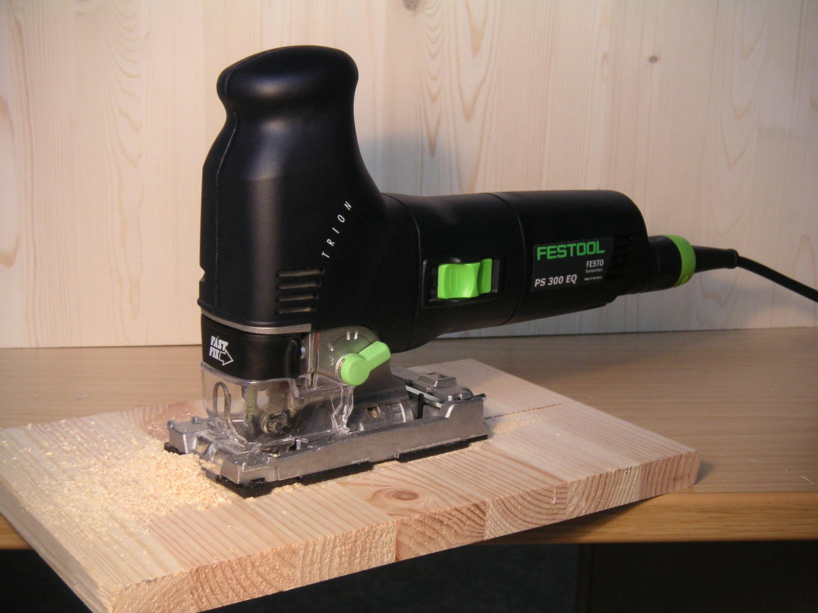 Pendelhubstichsäge Festool PS 300 EQ selbst fotografiert Oxensepp 2008-01-05